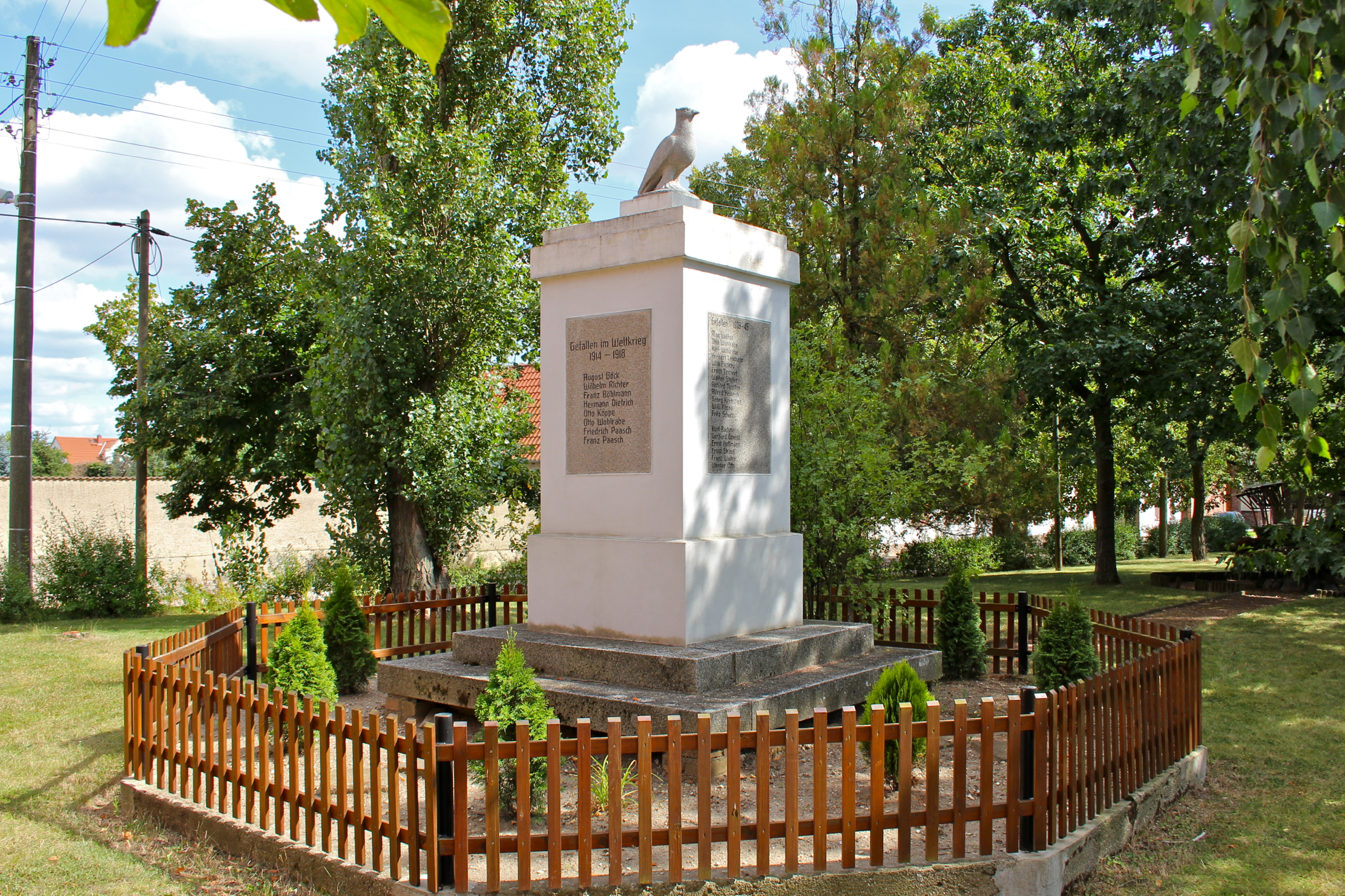 Riesdorf ist ein Ortsteil der Stadt Südliches Anhalt im Landkreis Anhalt-Bitterfeld in Sachsen-Anhalt.